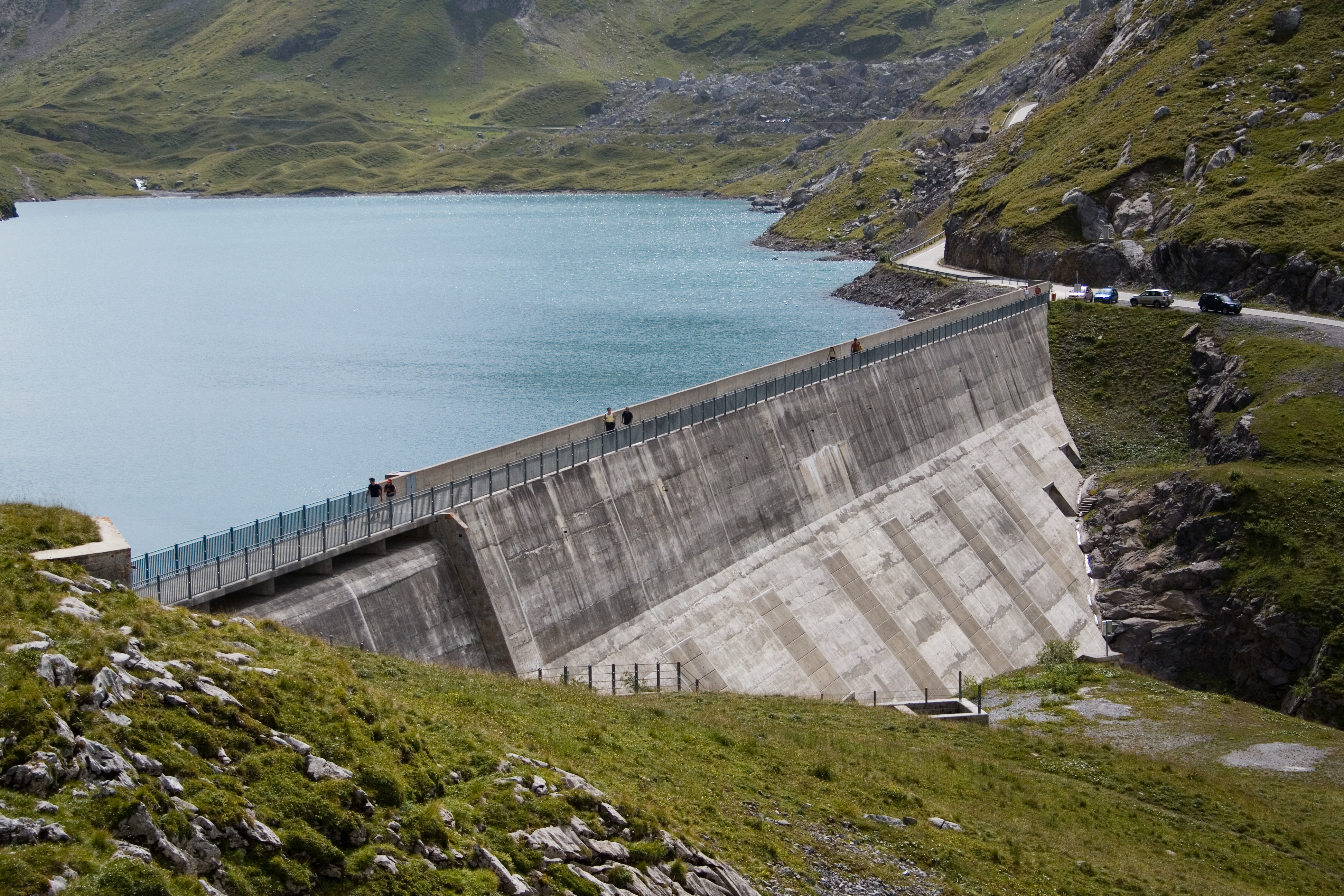 Sanetsch, canton du Valais, Suisse